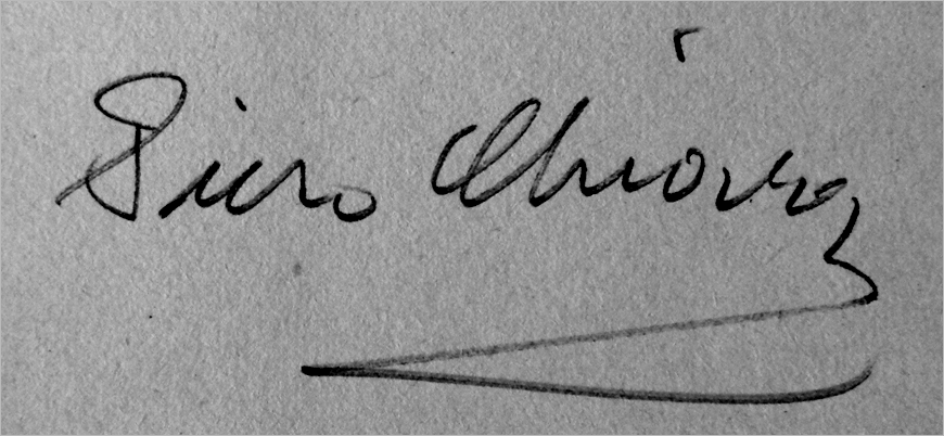 La firma dello scrittore Piero Chiara. Immagine trasformata in bianco e nero e resa più leggibile